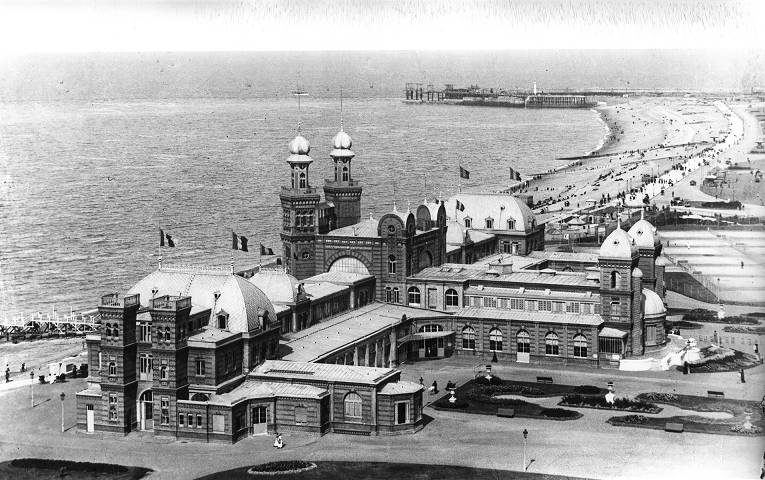 Det mauriske casino i Dieppe, 1823.